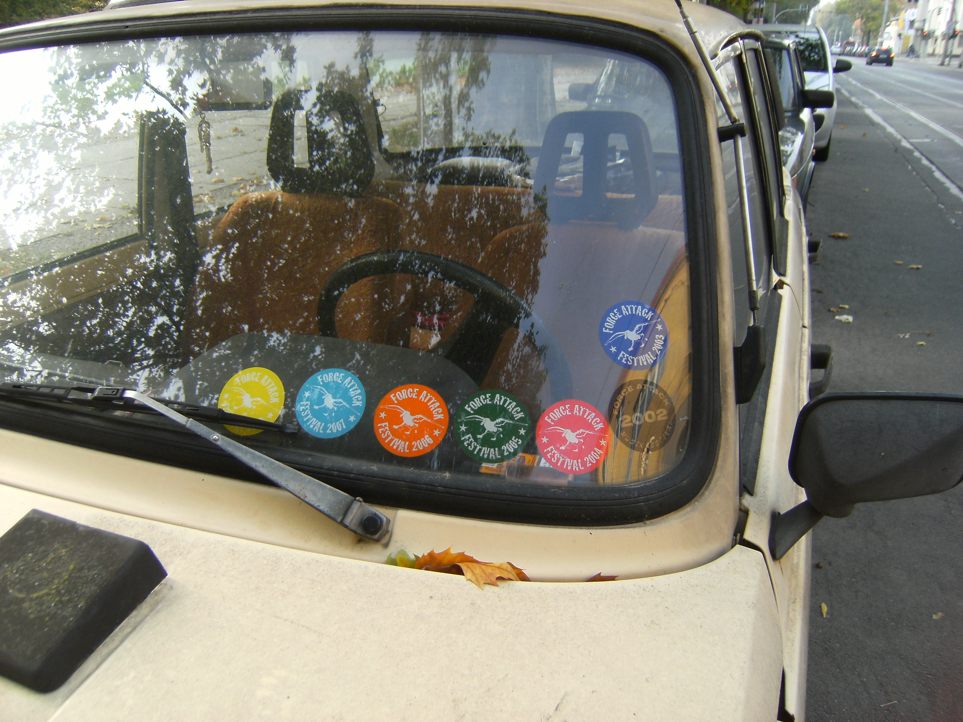 Wartburg in Pankow 2008